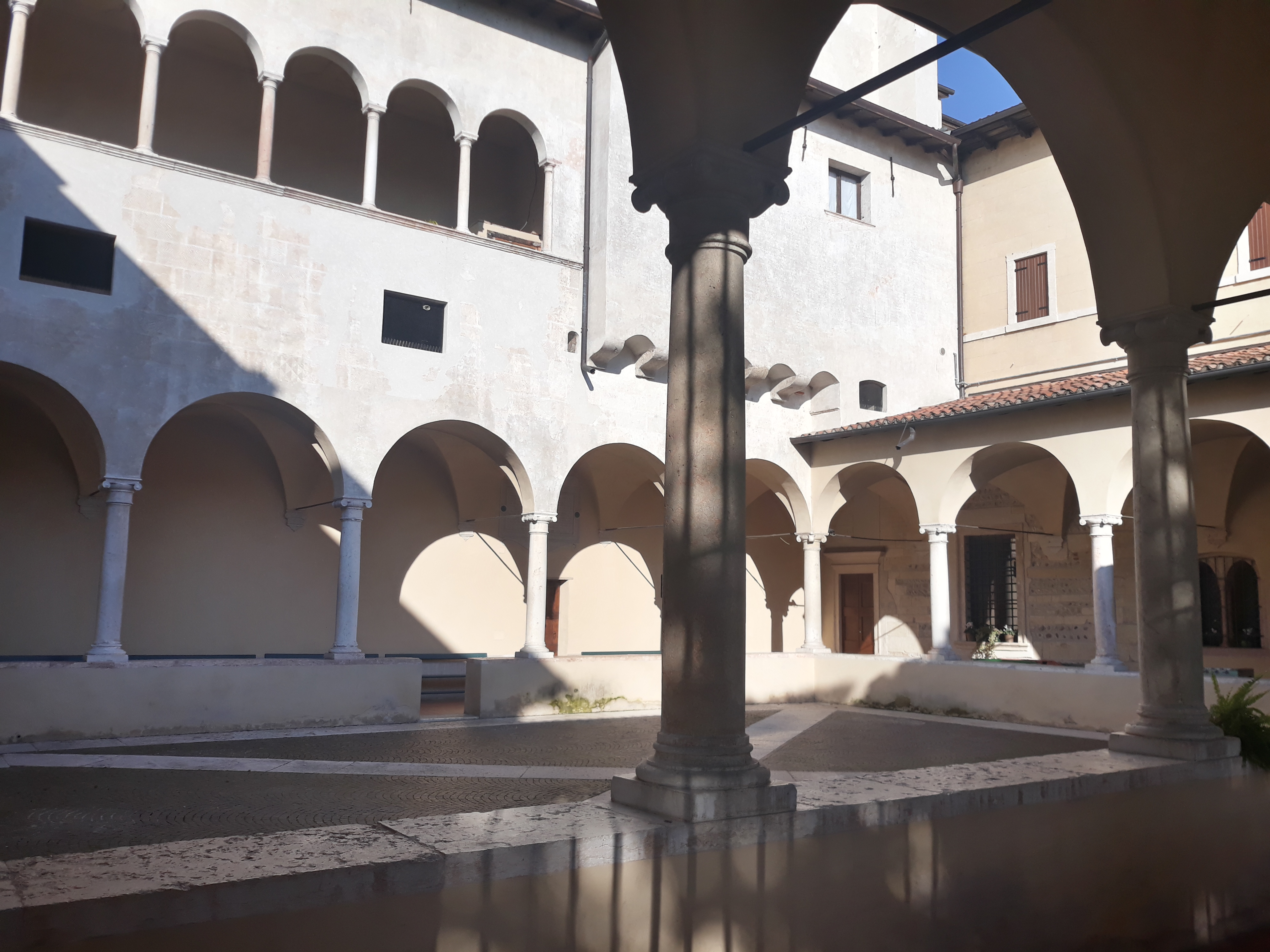 Chiosto cinquecentesco di san Giorgio in Braida